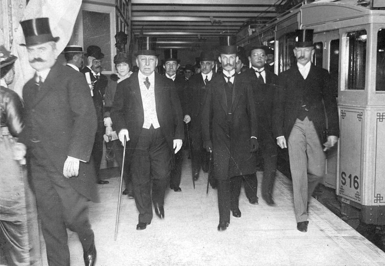 El vice presidente Victorino de la Plaza (con bastón) inaugura la Línea A del Subte de Buenos Aires